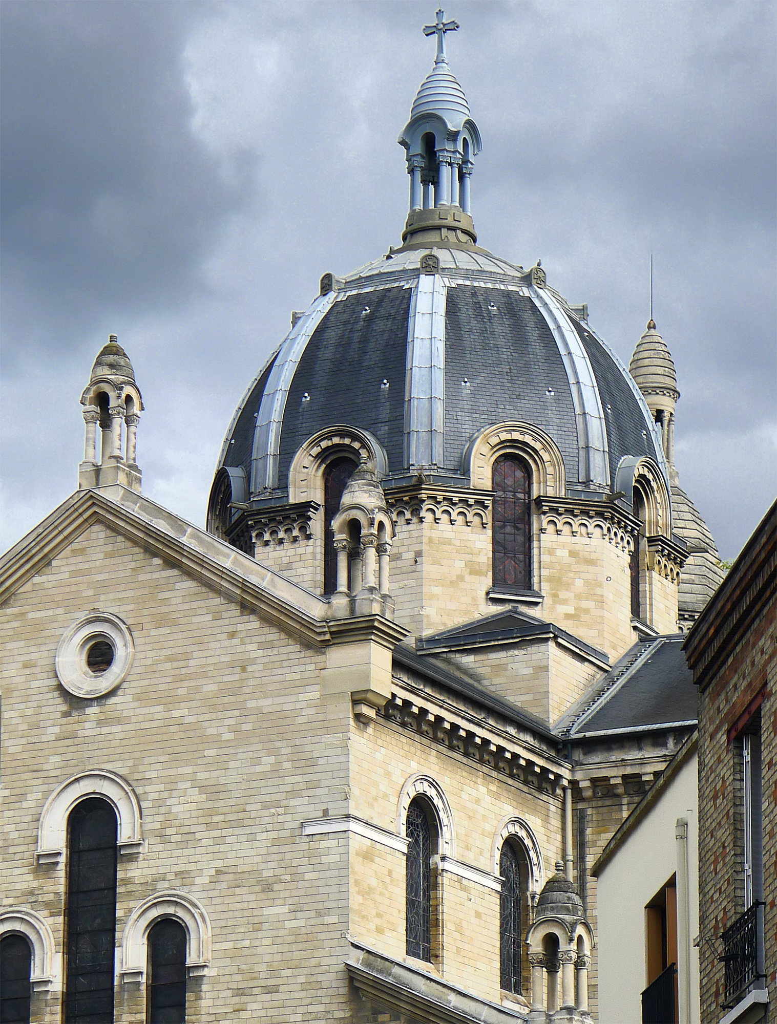 Église Sainte-Anne-de-la-Butte-aux-Cailles - Paris XIII